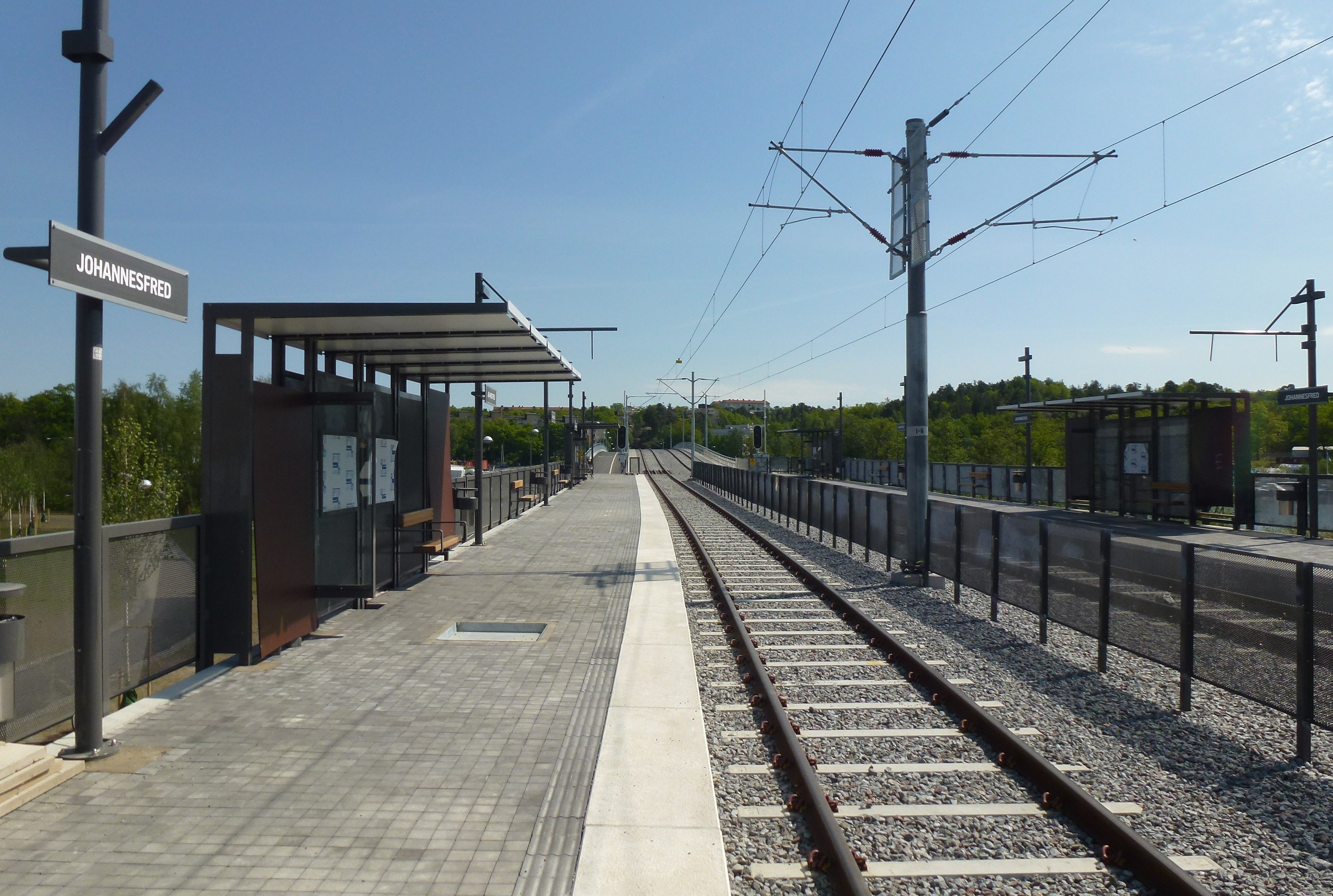 Tvärbanans nya hållplats "Johannesfred"